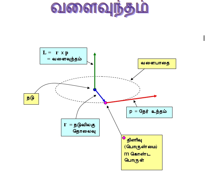 இது நான் வரைந்த படம். இதனை பொது உரிமை வெளியில் இடுகின்றேன். பகுப்பு:தமிழில் விளக்க வரைபடங்கள்